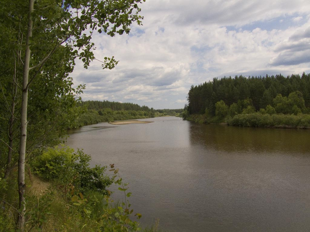 Большая Кокшага